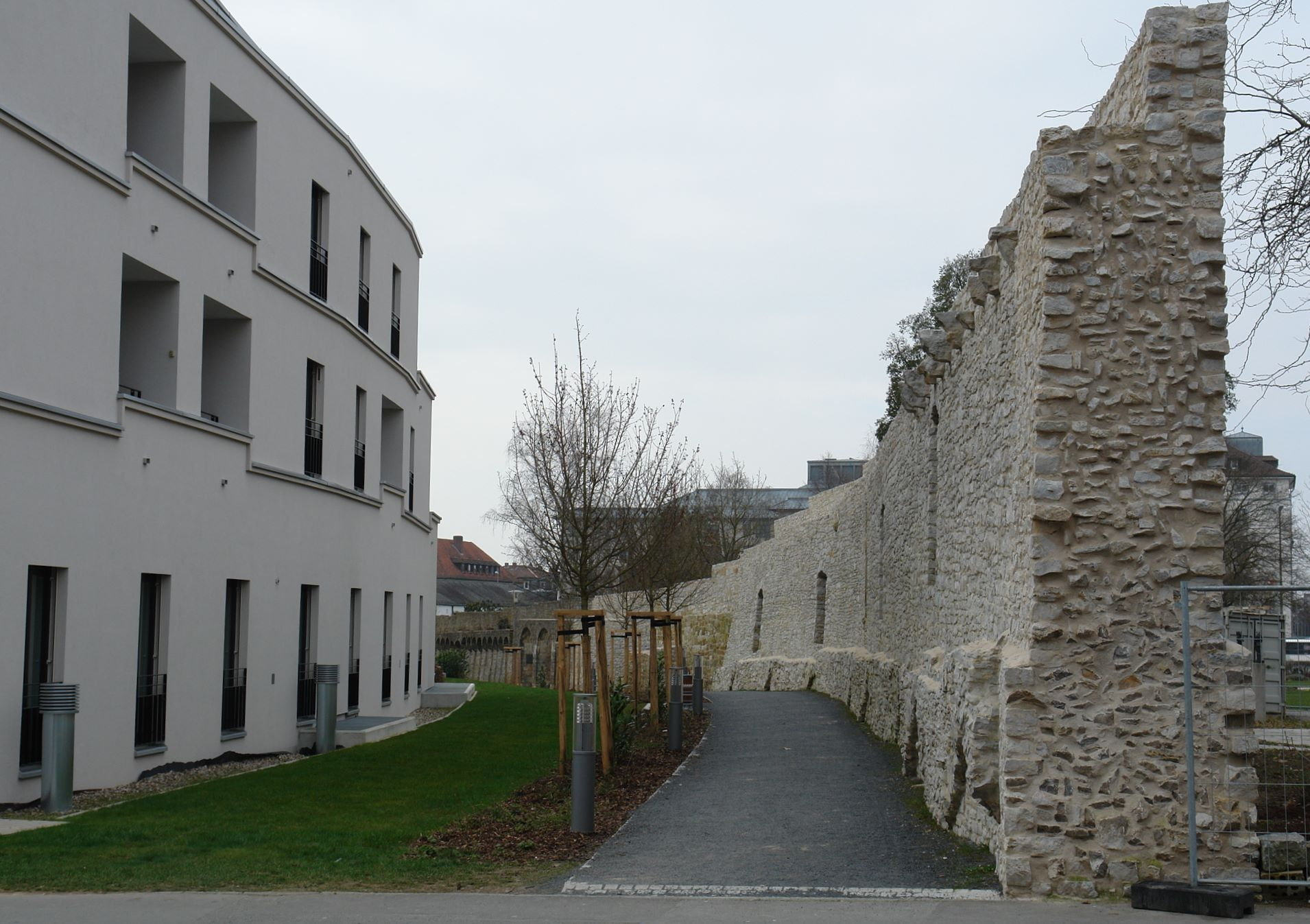 Stadtmauer an der Neutorstraße in Schweinfurt